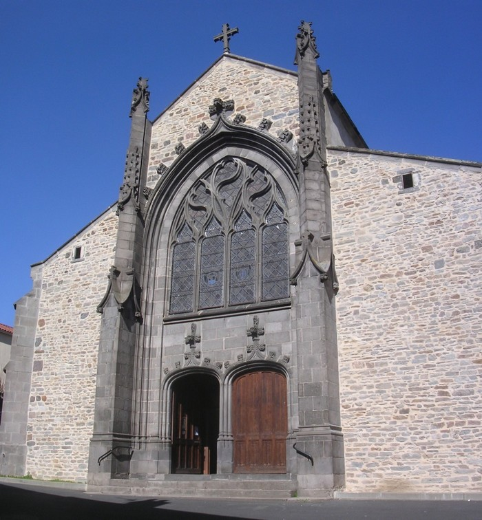 Façade de l'église Saint André de Massiac